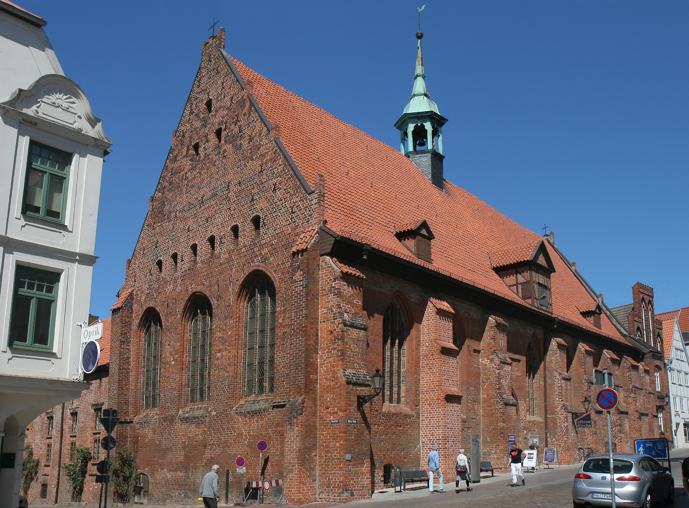 Heiligen-Geist-Kirche in Wismar, Lübsche Straße.